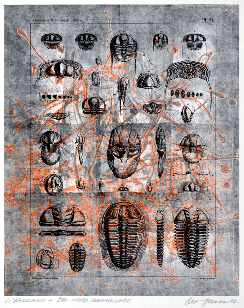 Oldřich Hamera, Derealizace Barrandienu, strukturální monotyp, 29x23,5 cm, 2002